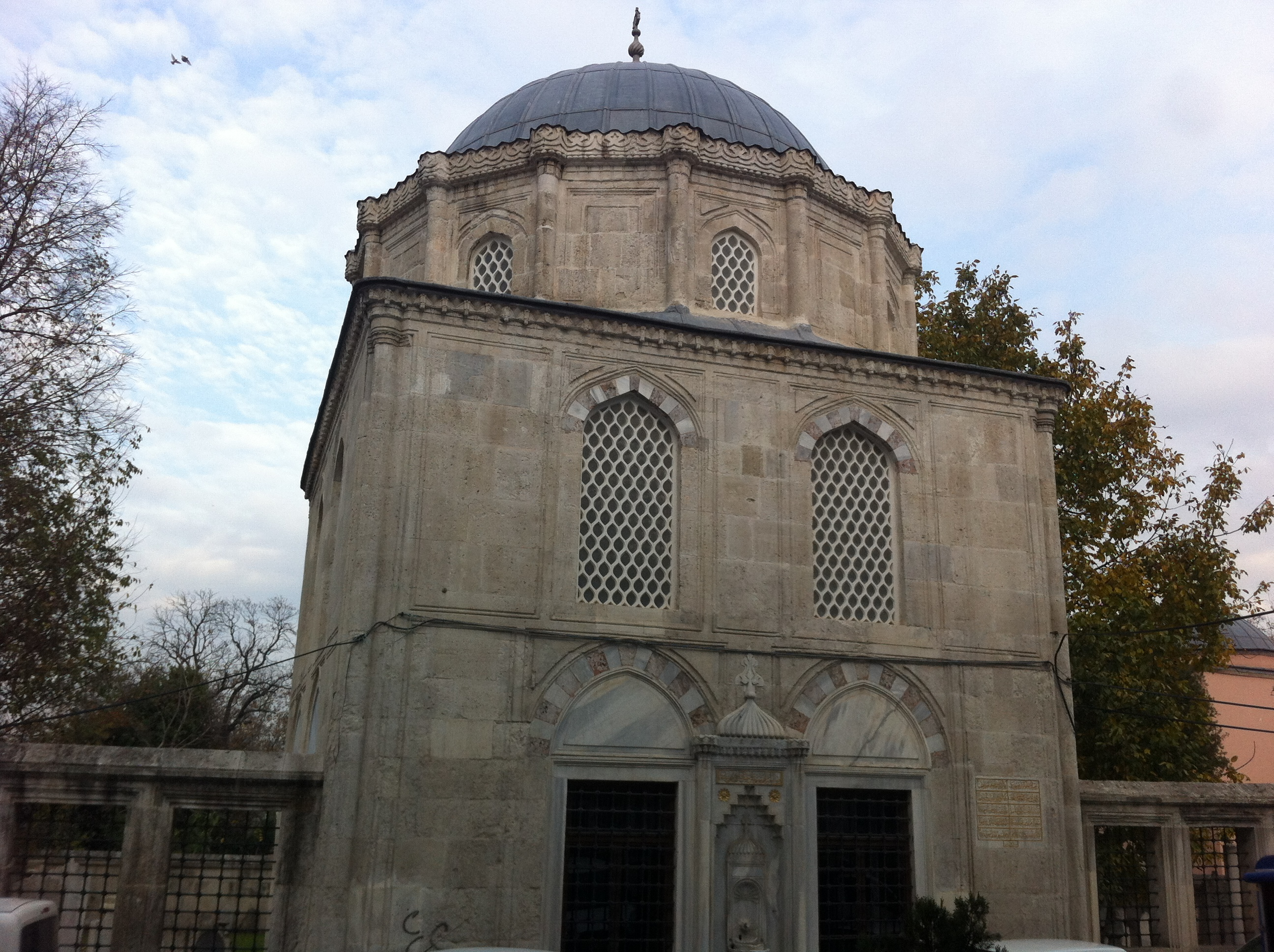 Nakkaş Hasan Paşa Türbesi-Eyüp